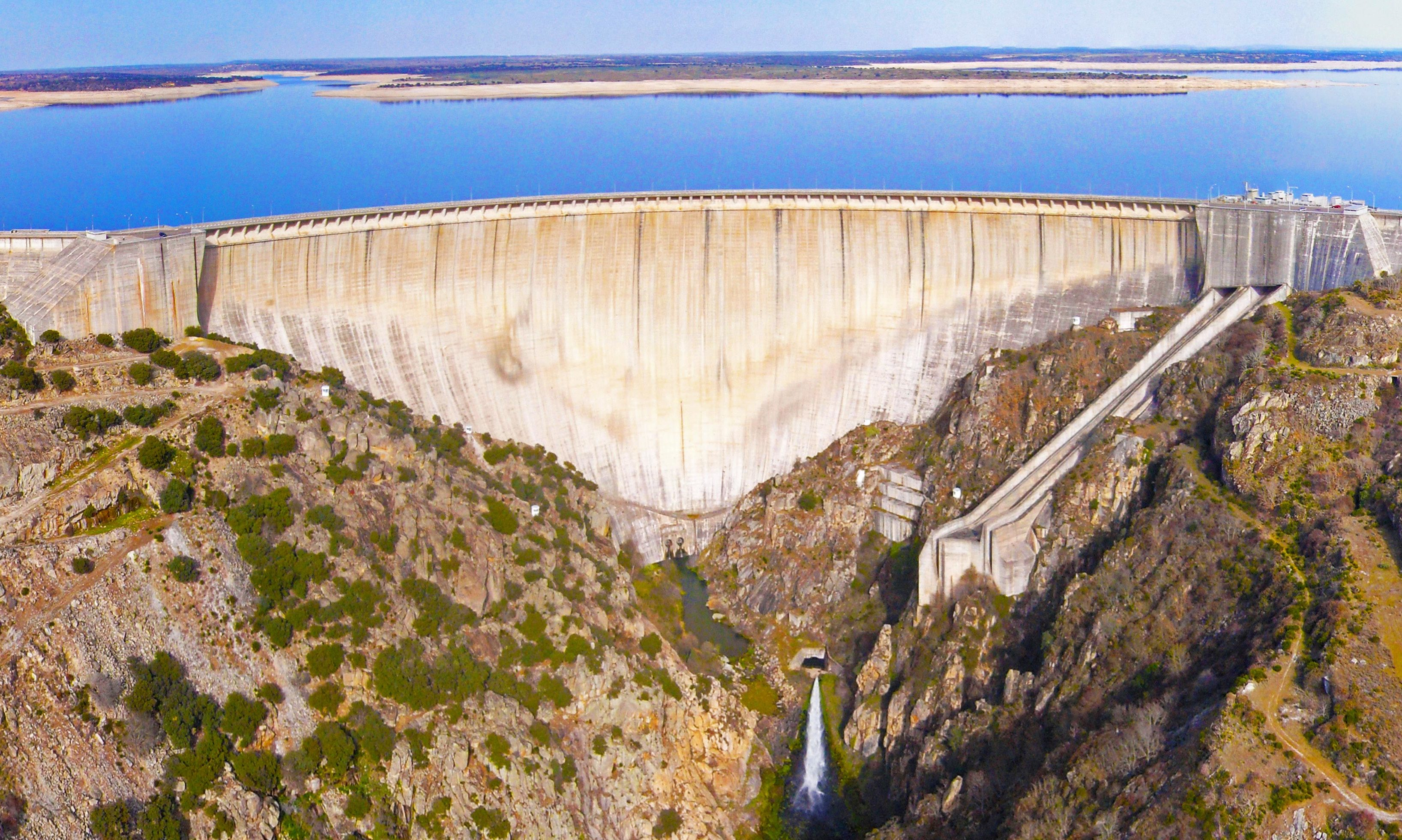 Toma panorámica mediante dron de la Presa de Almendra (Río Tormes, Salamanca, España).